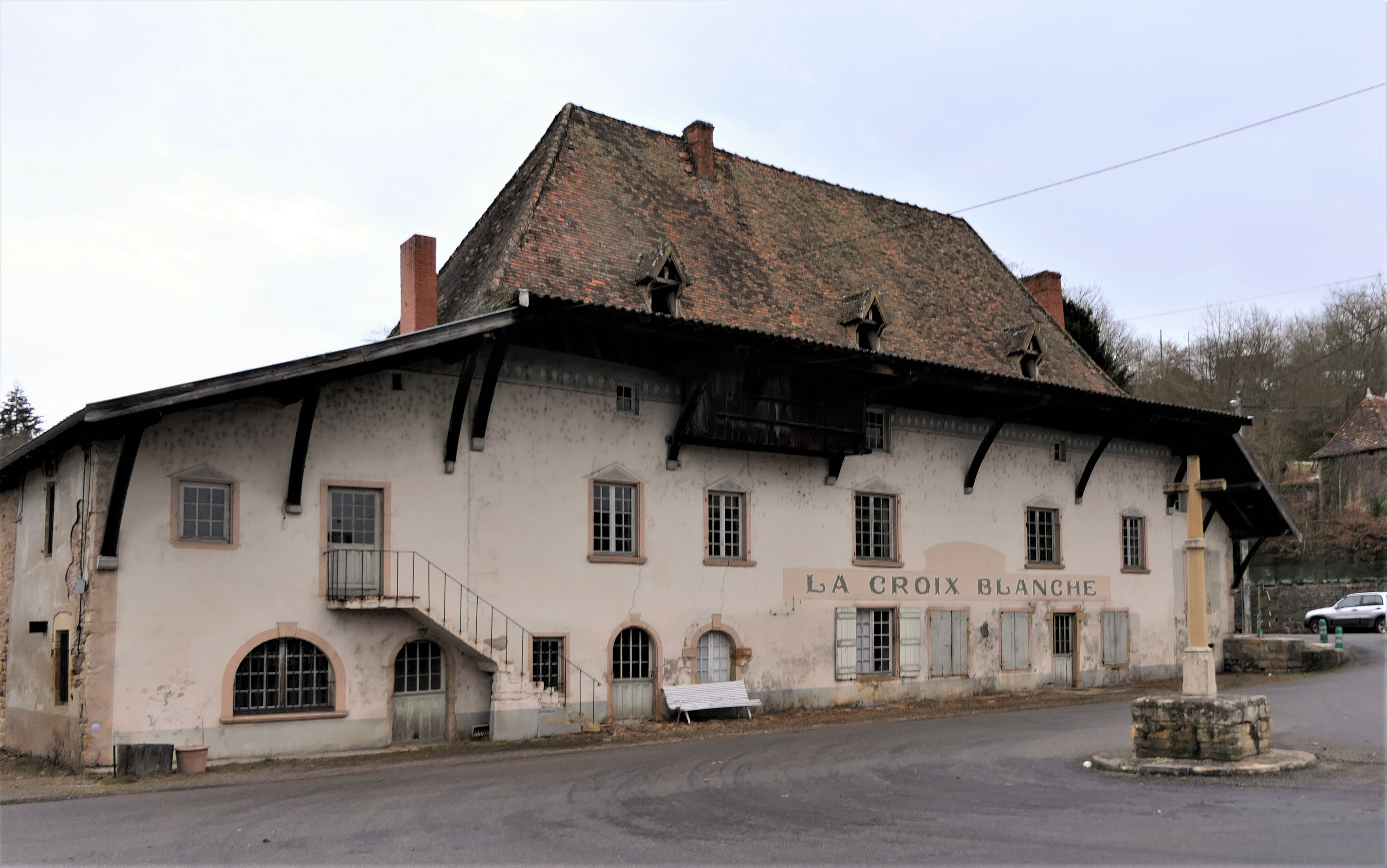 Châteauneuf (Saône-et-Loire) ancienne auberge et relais de diligence la Croix-blanche